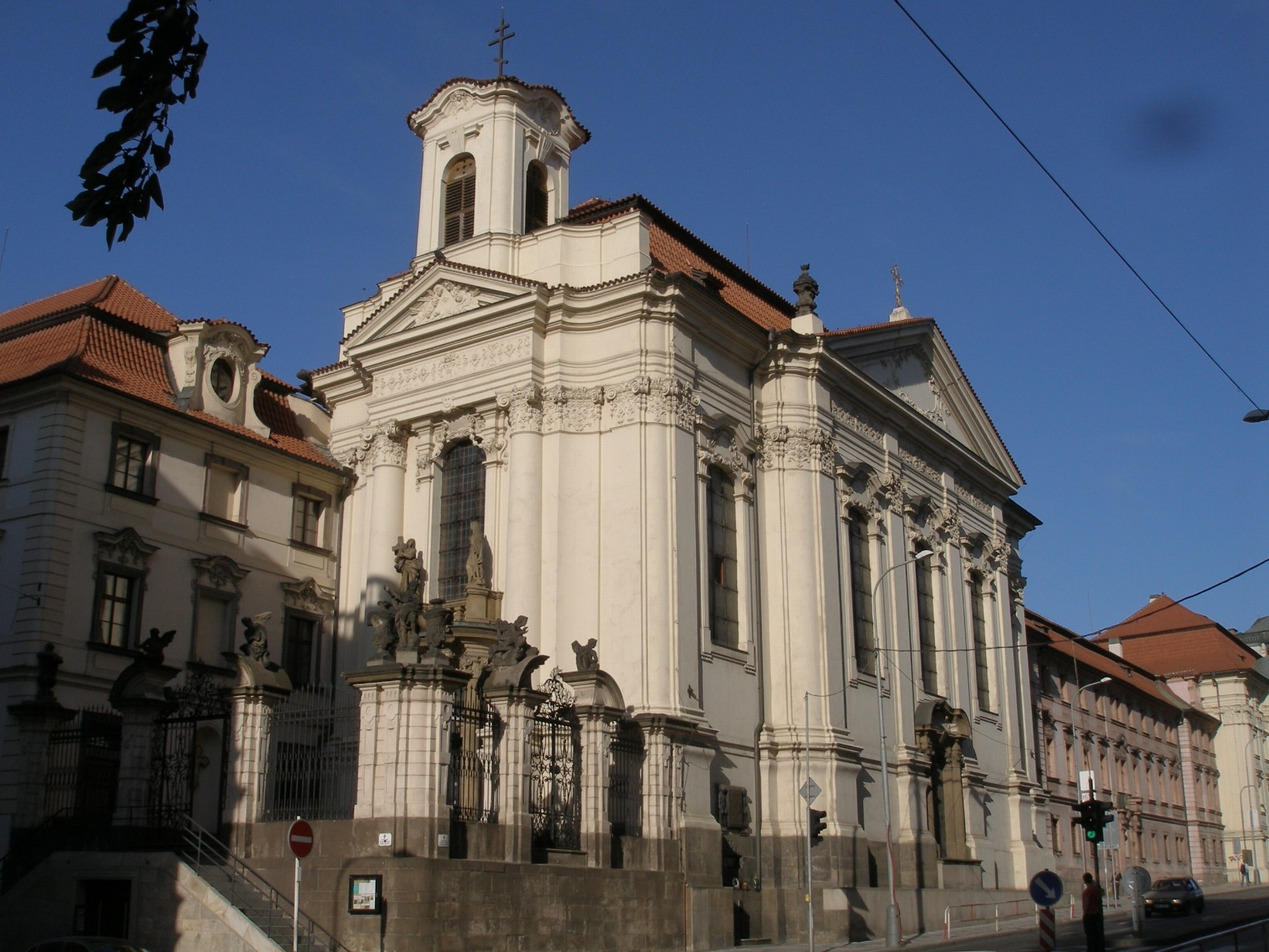 Pravoslavný chrám sv. Cyrila a Metoděje v Praze